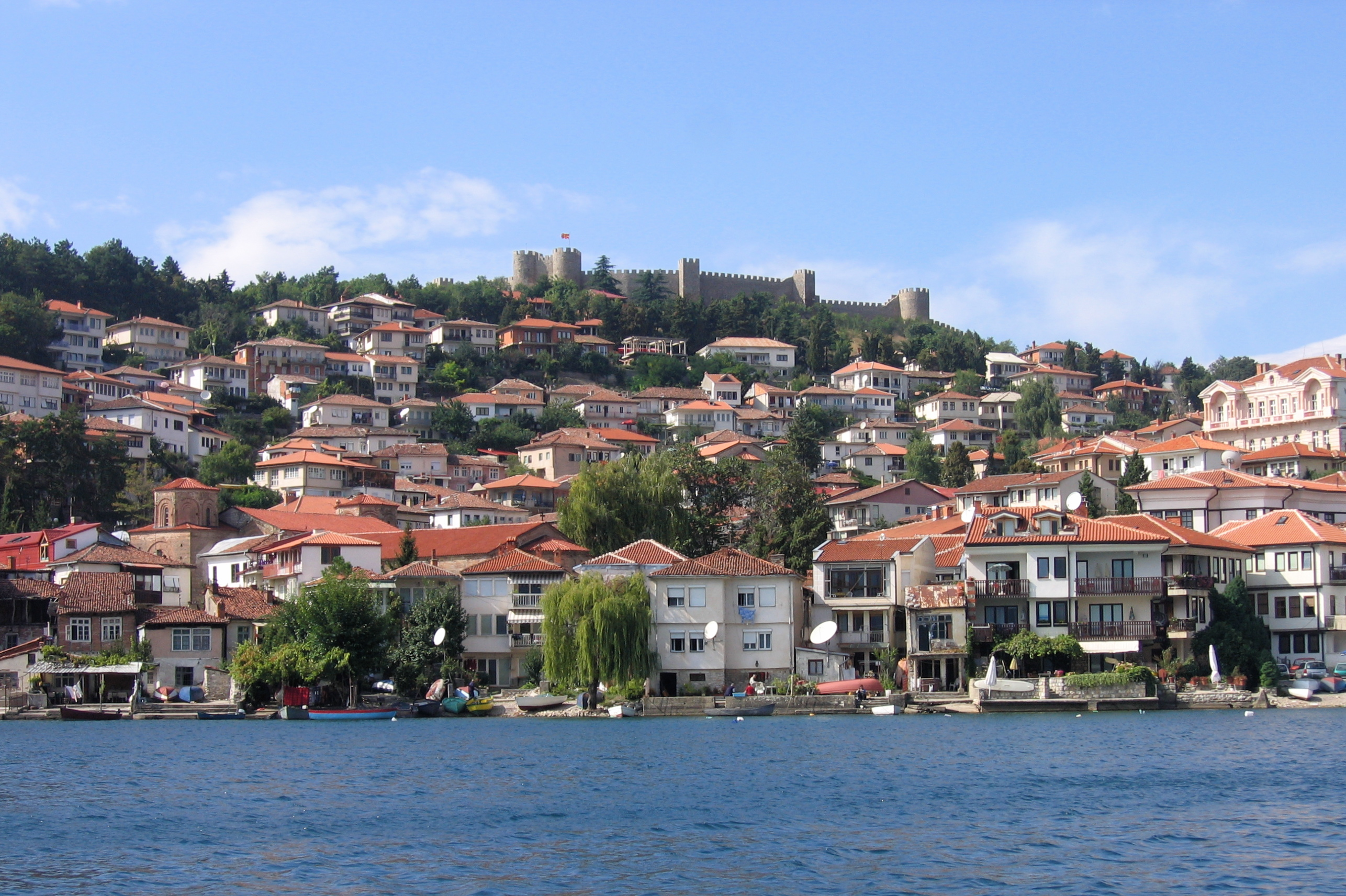 Охрид_2005_2941